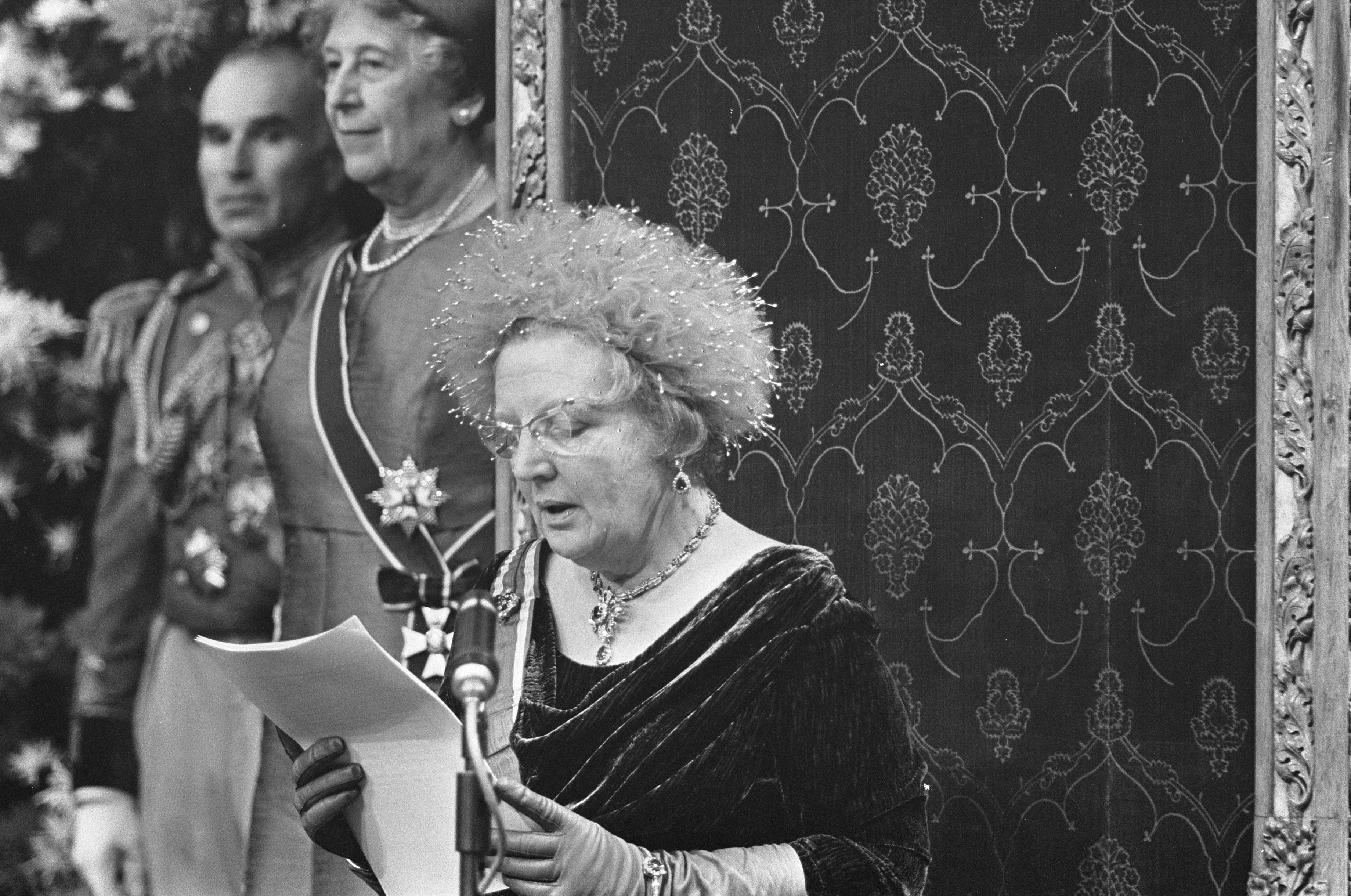 Collectie / Archief : Fotocollectie Anefo Reportage / Serie : Prinsjesdag 1967 Beschrijving : Koningin Juliana tijdens het voorlezen van de Troonrede. Naast koningin Juliana de Opperstalmeester W.F.K. Bischoff van Heemskerk en de Grootmeesteres van de Koningin M.L.J.D. van Wickevoort Crommelin geboren jkvr. Teixeira de Mattos Datum : 19 september 1967 Locatie : Den Haag, Zuid-Holland Trefwoorden : koninginnen, prinsjesdagen, troonredes Persoonsnaam : Bischoff van Heemskerck, W.F.K., Juliana (koningin Nederland), Wickevoort Crommelin, M.LJ.D van Fotograaf : Fotograaf Onbekend / Anefo Auteursrechthebbende : Nationaal Archief Materiaalsoort : Negatief (zwart/wit) Nummer archiefinventaris : bekijk toegang 2.24.01.05 Bestanddeelnummer : 920-7193